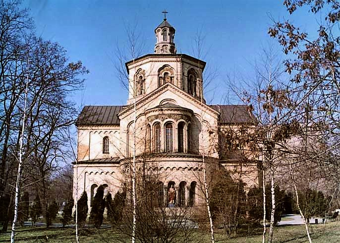 St. Spirit Polish Catholic Church Catedral in Warsaw Katedra Kościoła Polskokatolickiego pw. Świętego Ducha w Warszawie